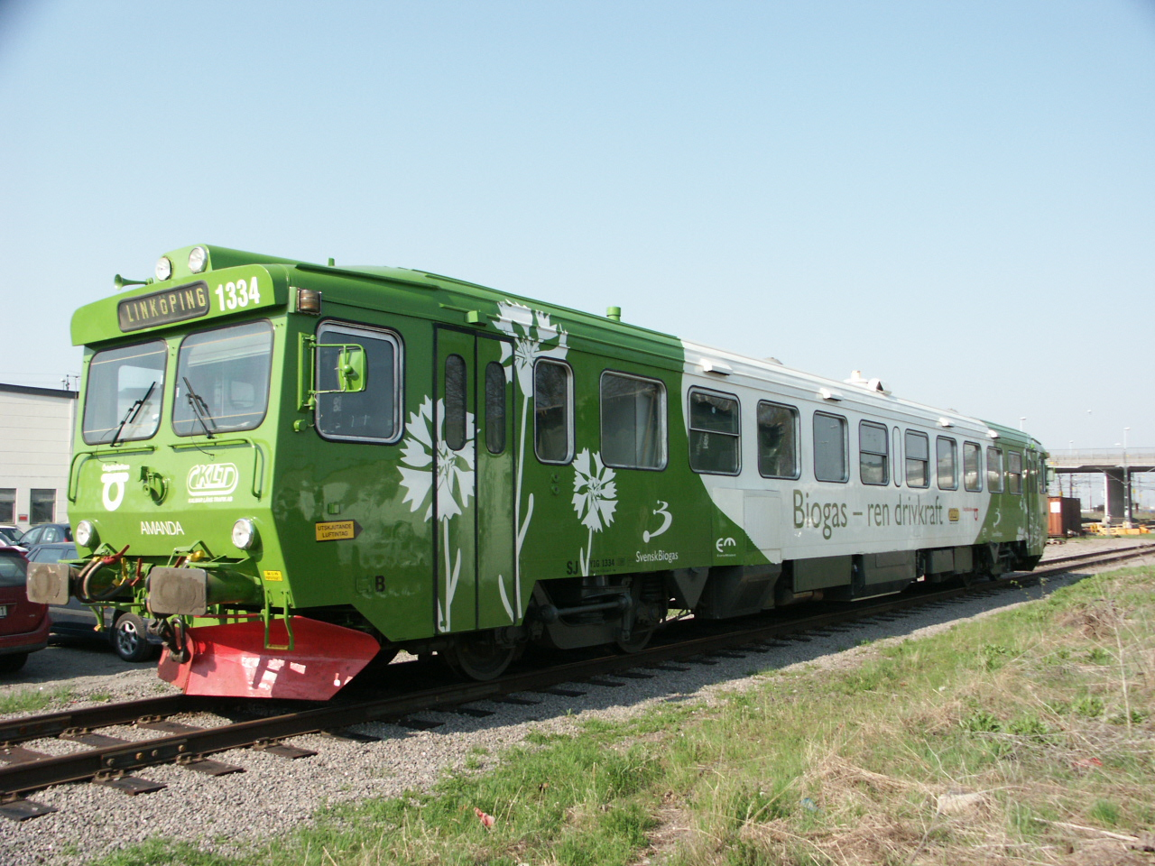 Biogaståget Amanda i Linköping 2006